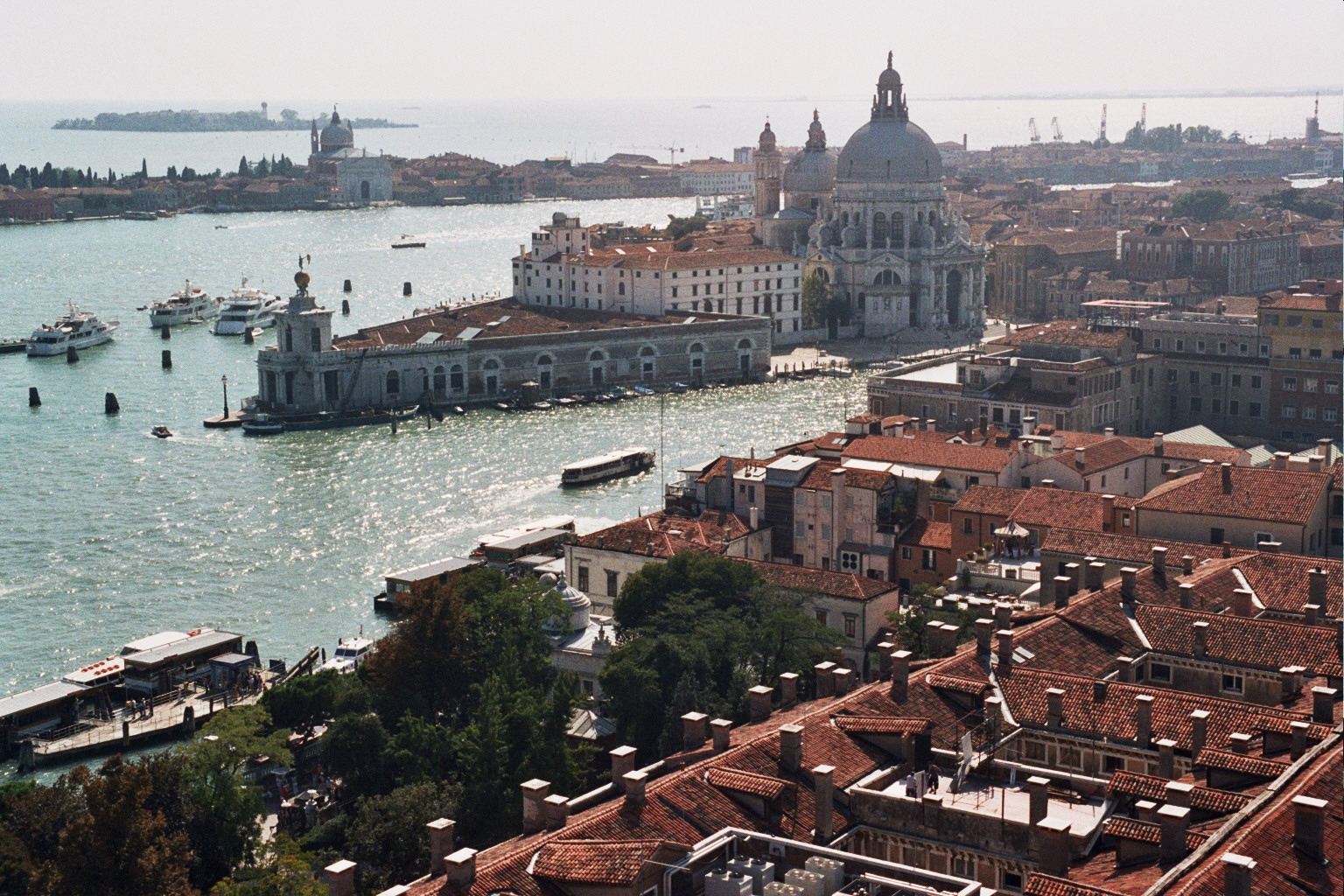 Punte della Dugana in Venice seen from San Marco